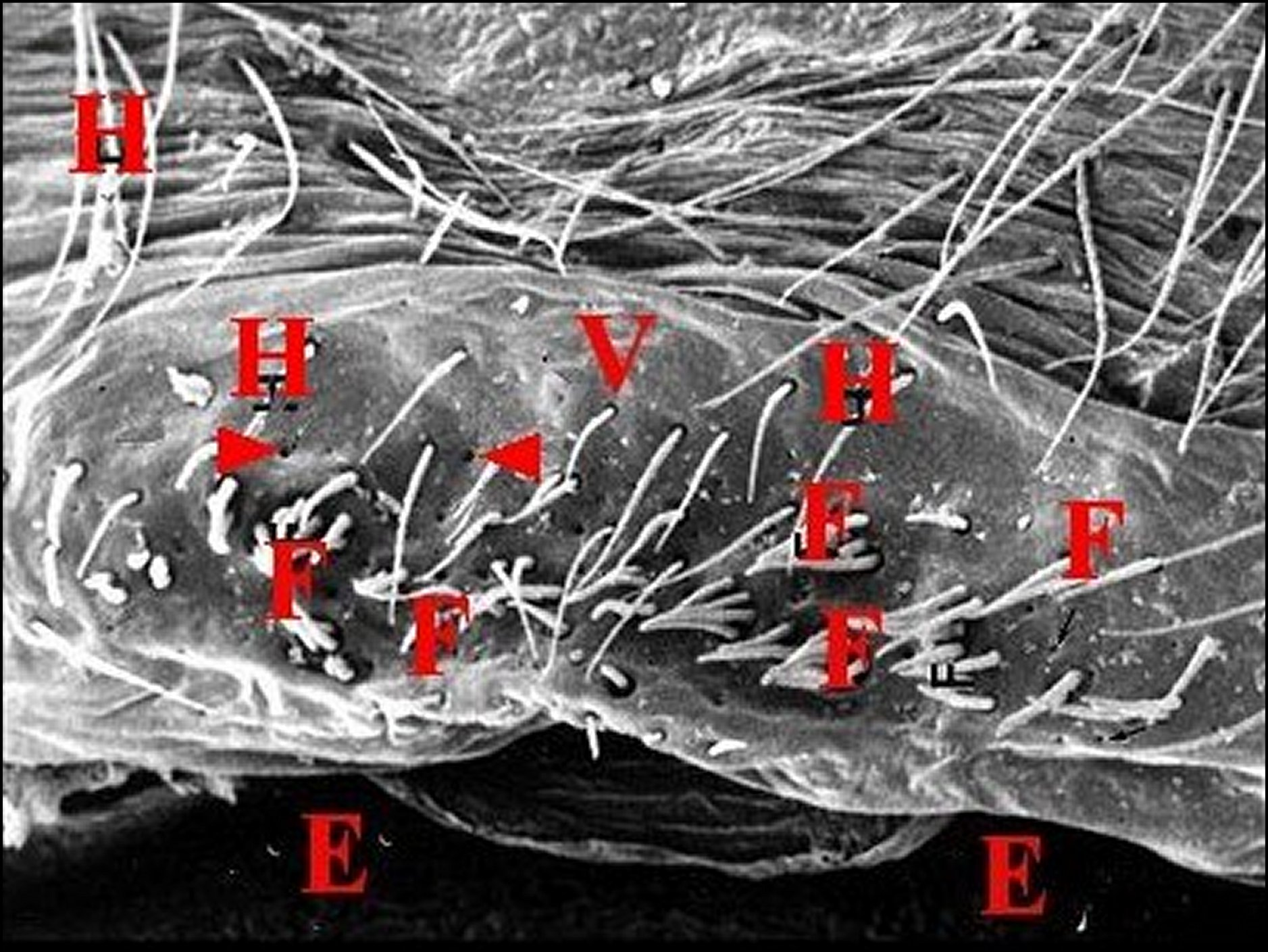 Région épigastrique d'une Meta menardi, vue d'ensemble au microscope électronique à balayage.